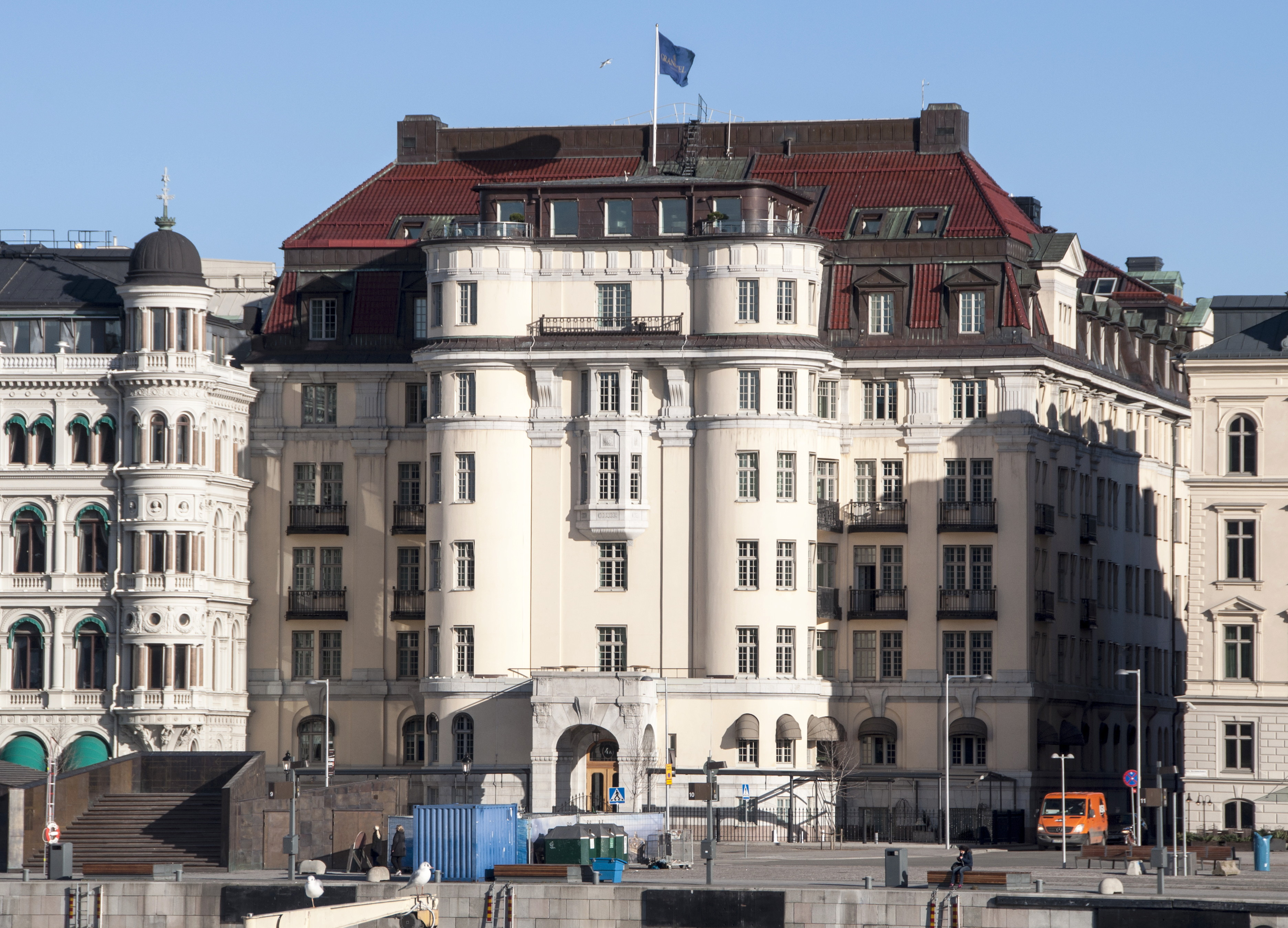 Bumanska palatset, Södra Blasieholmshamnen 4, Nybyggnadsår 1909 - 1911, Axel Burman sterbhus (Byggherre) Hagström & Ekman (Arkitekt) J Norén (Byggmästare)